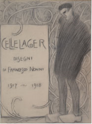 Copertina dell'album dei disegni realizzati nel campo di Celle, pubblicato nel 1920